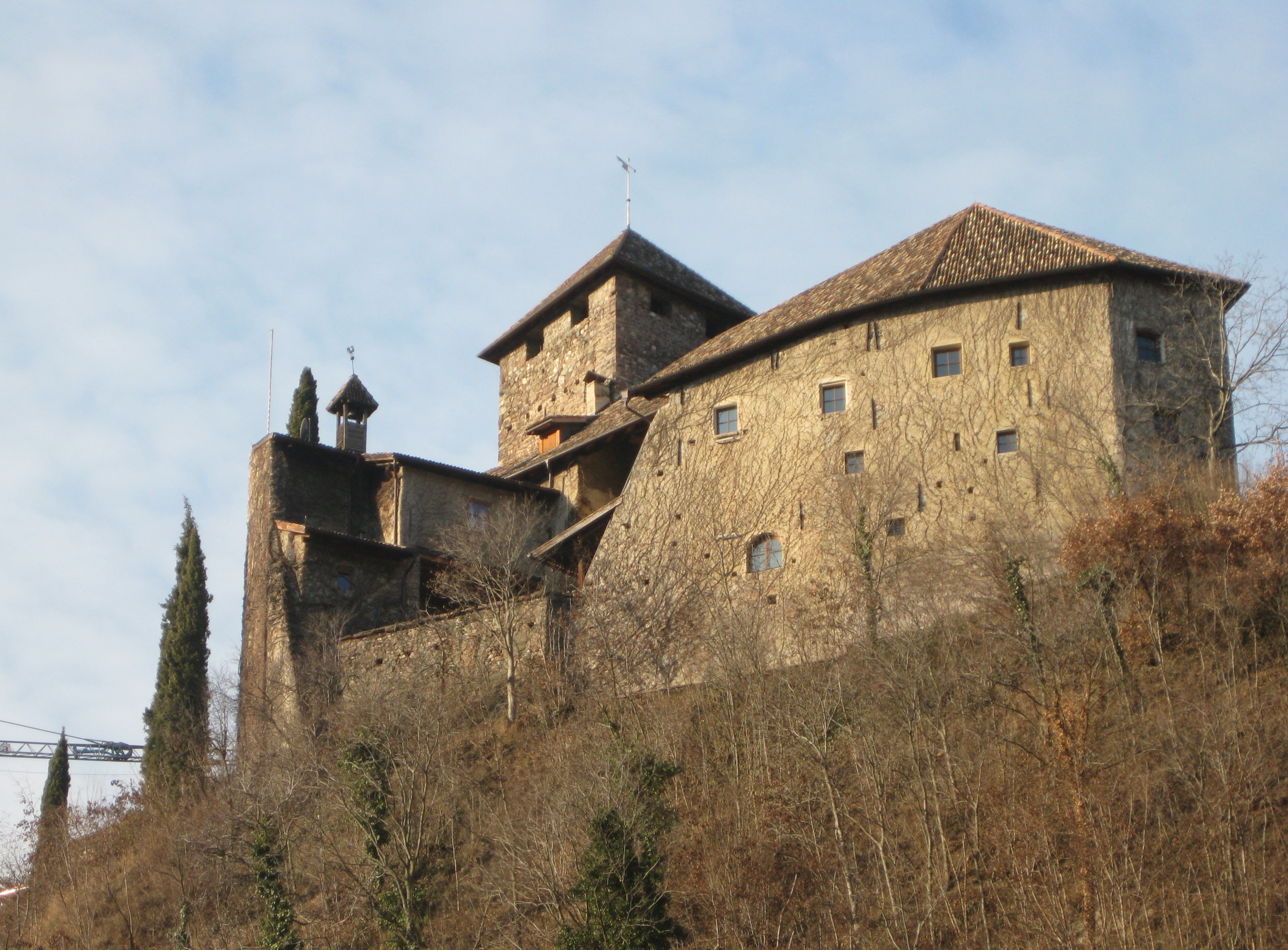 Burg Warth (auch Schloss Warth) bei St. Pauls in Eppan (Südtirol)